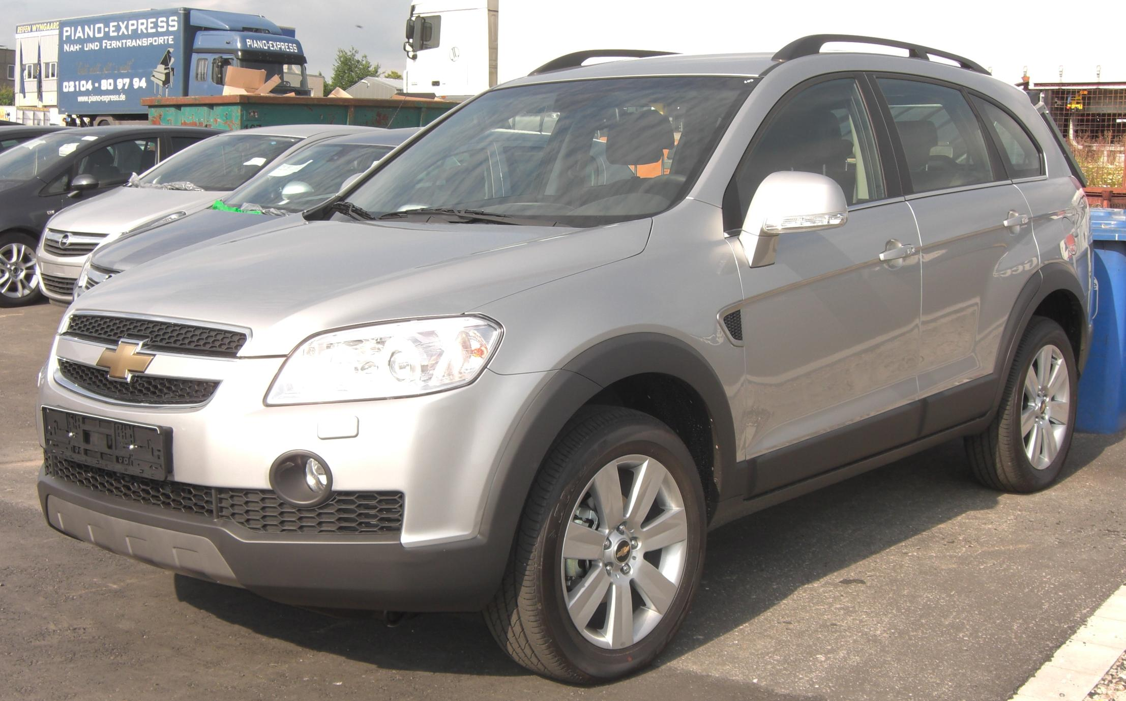 Chevrolet Captiva